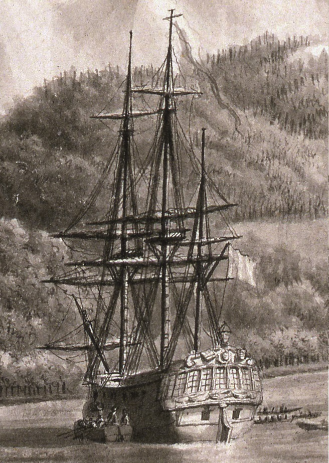 L'Astrolabe au mouillage probablement en Alaska. Détail d'un dessin réalisé pour l'Atlas du voyage de La Pérouse publié en 1797. Navire commandé par Paul Fleuriot de Langle.